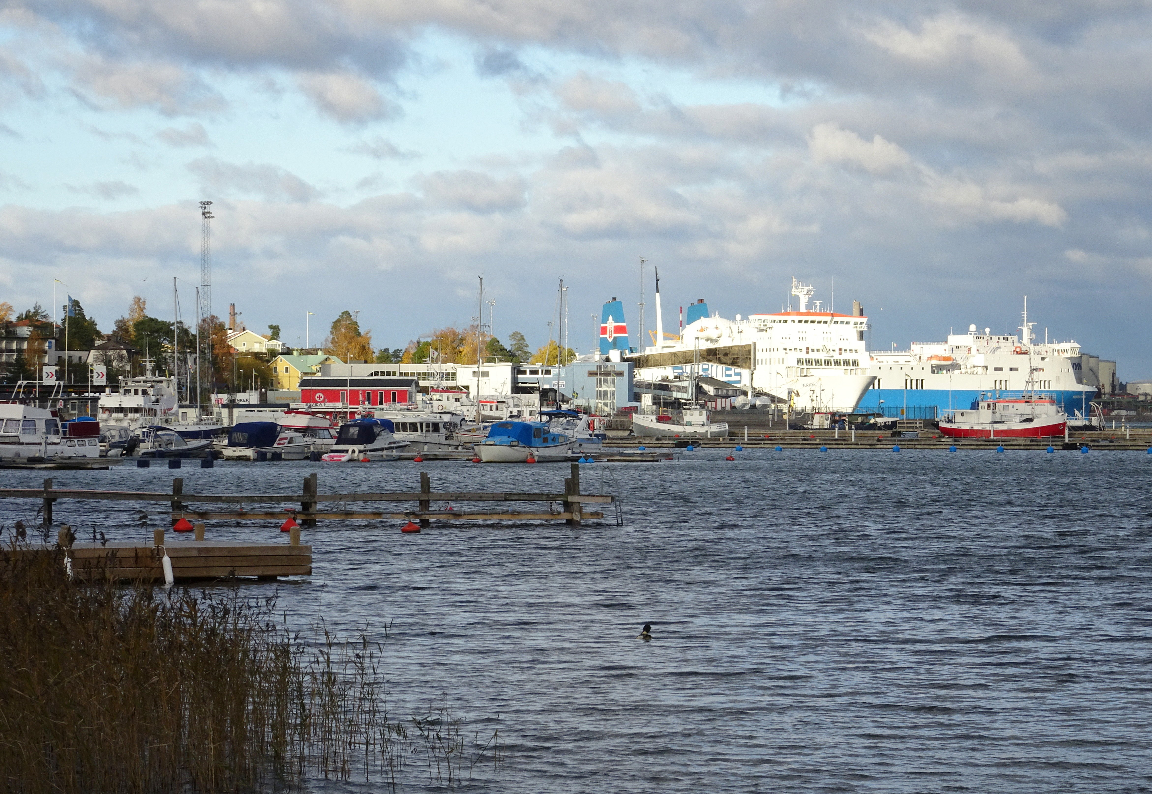 Nynäshamns hamn och färjeterminal